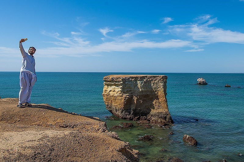 بندر تنگ سیستان و بلوچستان بندر تنگ بخش کوچکی است در شهر چابهار که به دلیل تلاقی کویر و دریا در این منطقه جذابیت های ویژه ای به وجود آمده که جلوه ی بی نظیری را به این روستا بخشیده است. شهرستان کنارک که در جنوب شرقی ایران و در سواحل زیبای دریای عمان قرار گرفته است، از دیرباز با اسکله صیادی بزرگ و فعالش یاد می‌شود. جاذبه های طبیعی بکر و بی نظیری در این بخش کوچک بندری وجود دارد دل هر گردشگری را می برد.سواحل شنی و ماسه ای و صخره ای وجود درخت انجیر معابد و تپه های گل افشان از جاذبه های این بندر بی نظیر است.